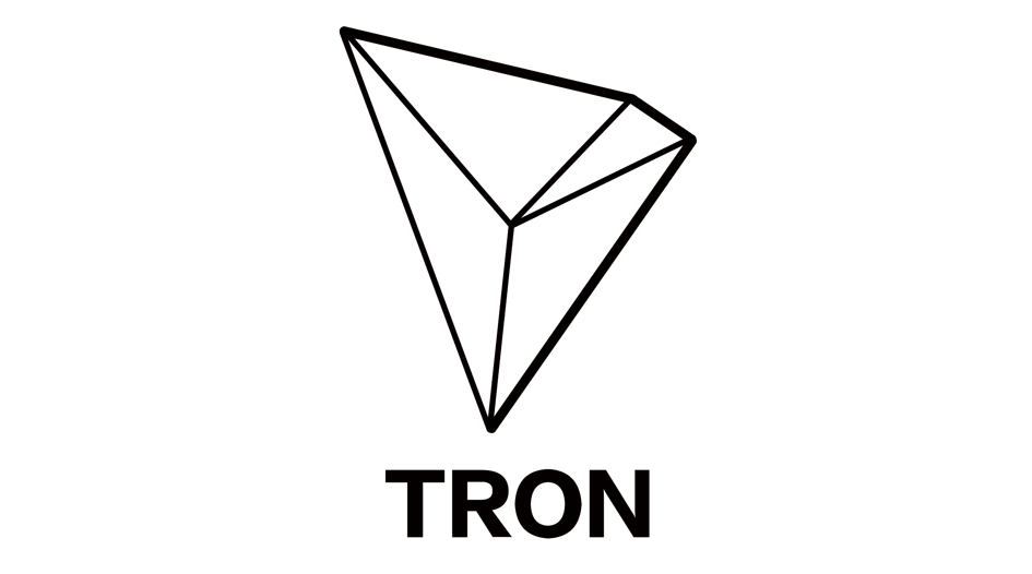 TRON